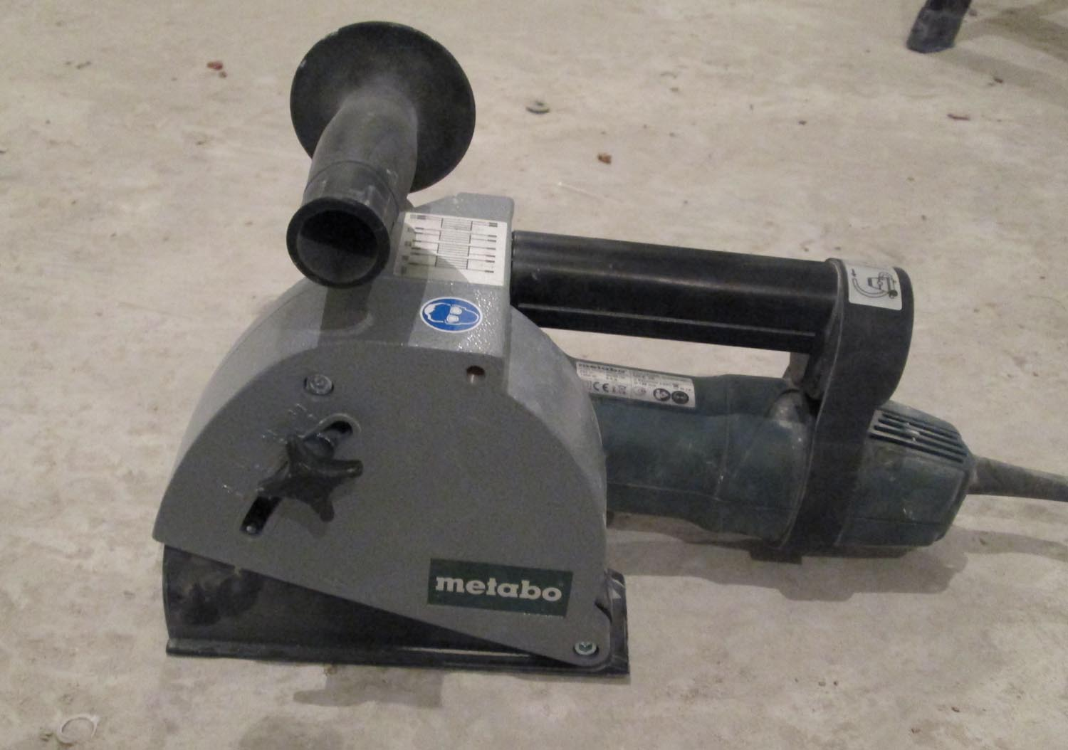 Штроборез Metabo. Модель MFE30.